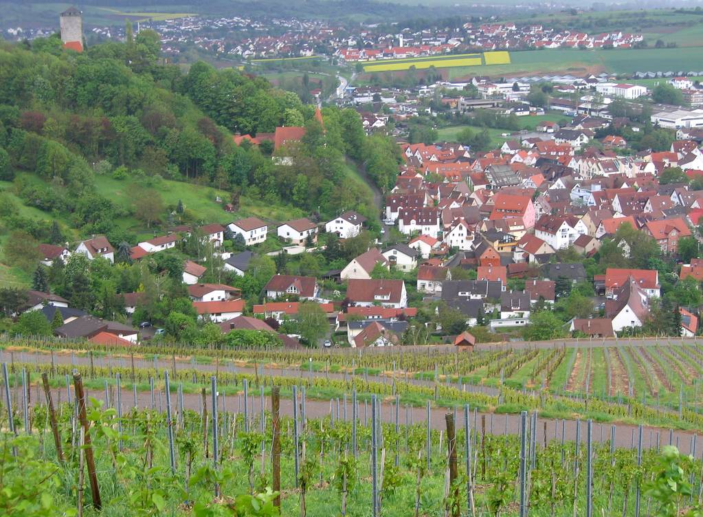 Beilstein in Württemberg with Hohenbeilstein